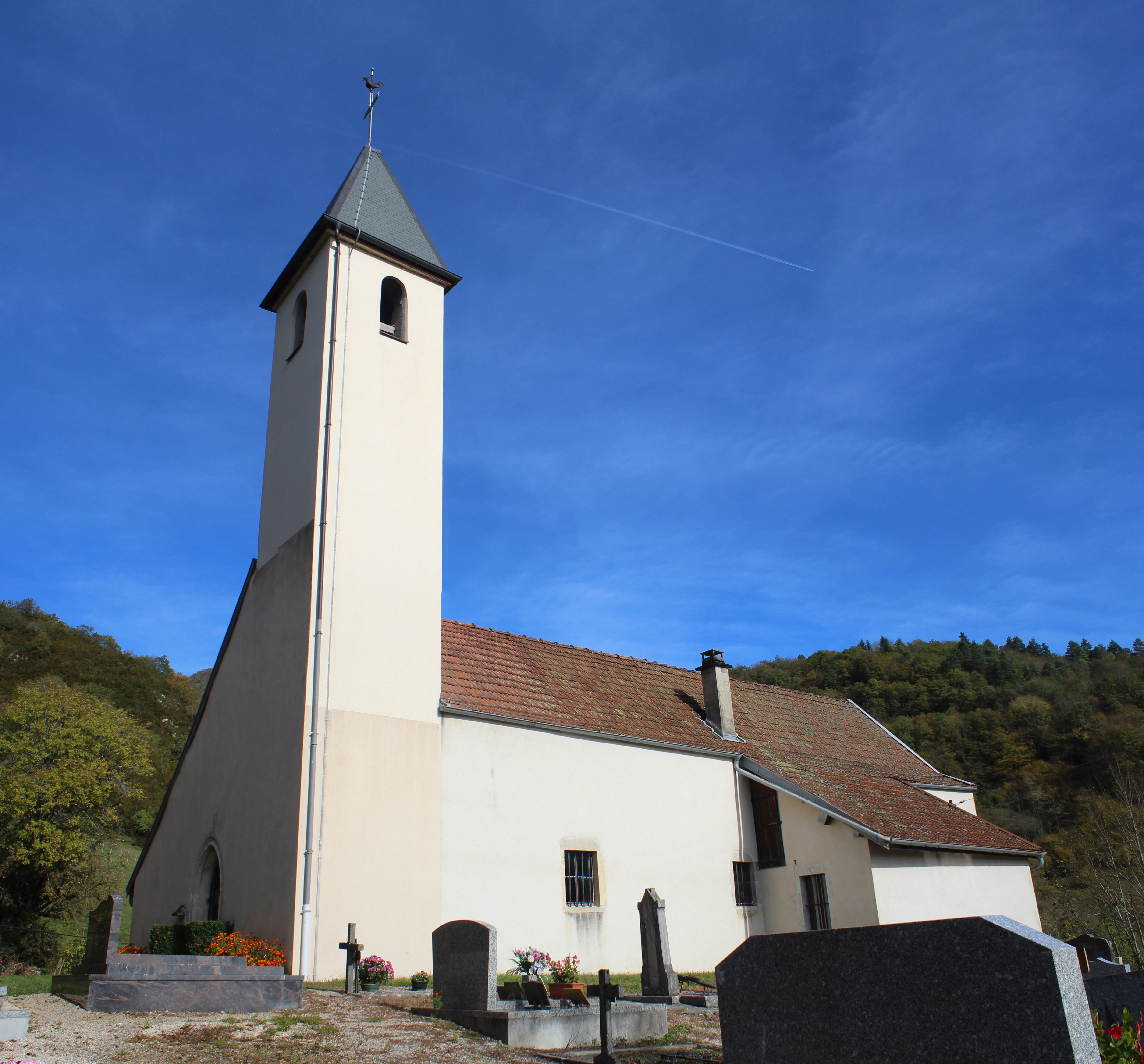 Église Saint-Pierre de Coisia, Thoirette-Coisia.